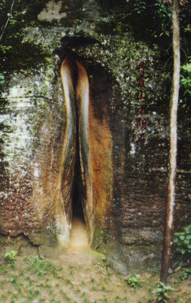 内容介绍：丹霞山阴元石 原创者：zhuwq自拍 创作日期：2003年7月。